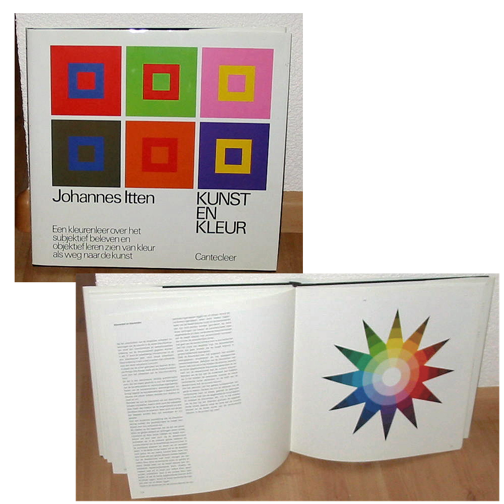 Collage foto's boek Johannes Itten, eigen foto door Gebruiker:Ellywa, ter beschikking gesteld onder GFDL